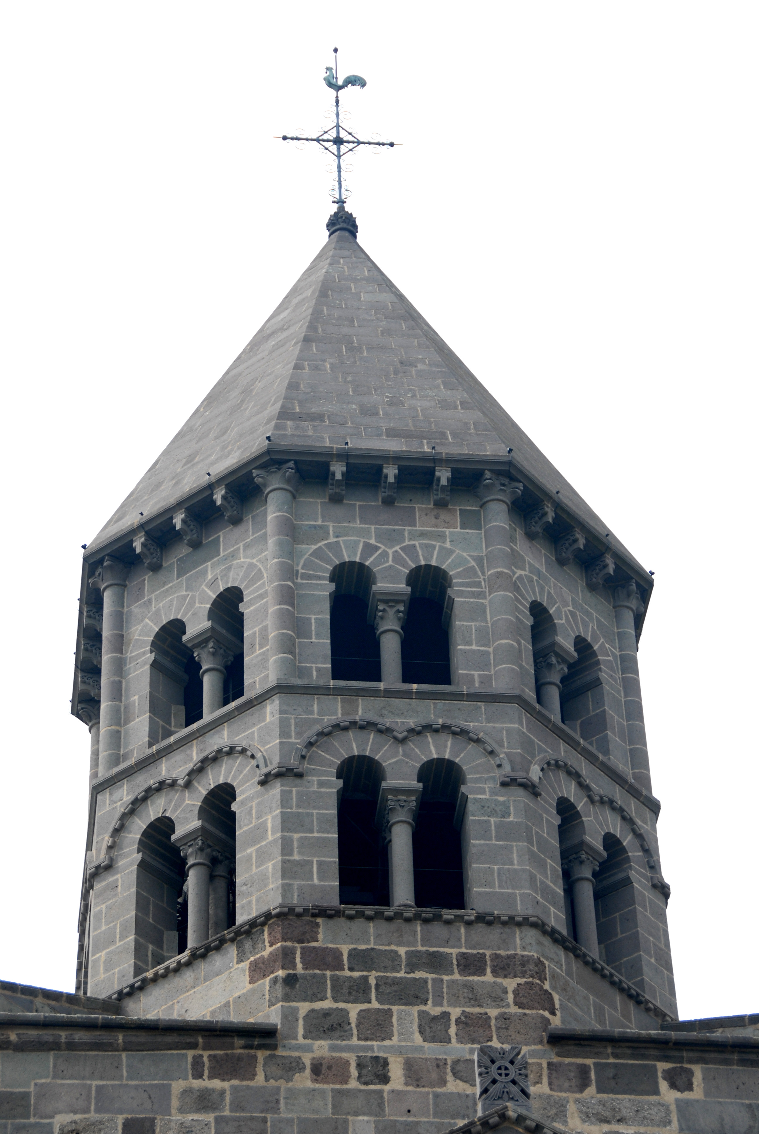 St.-Nectaire, Vierungsturm von O